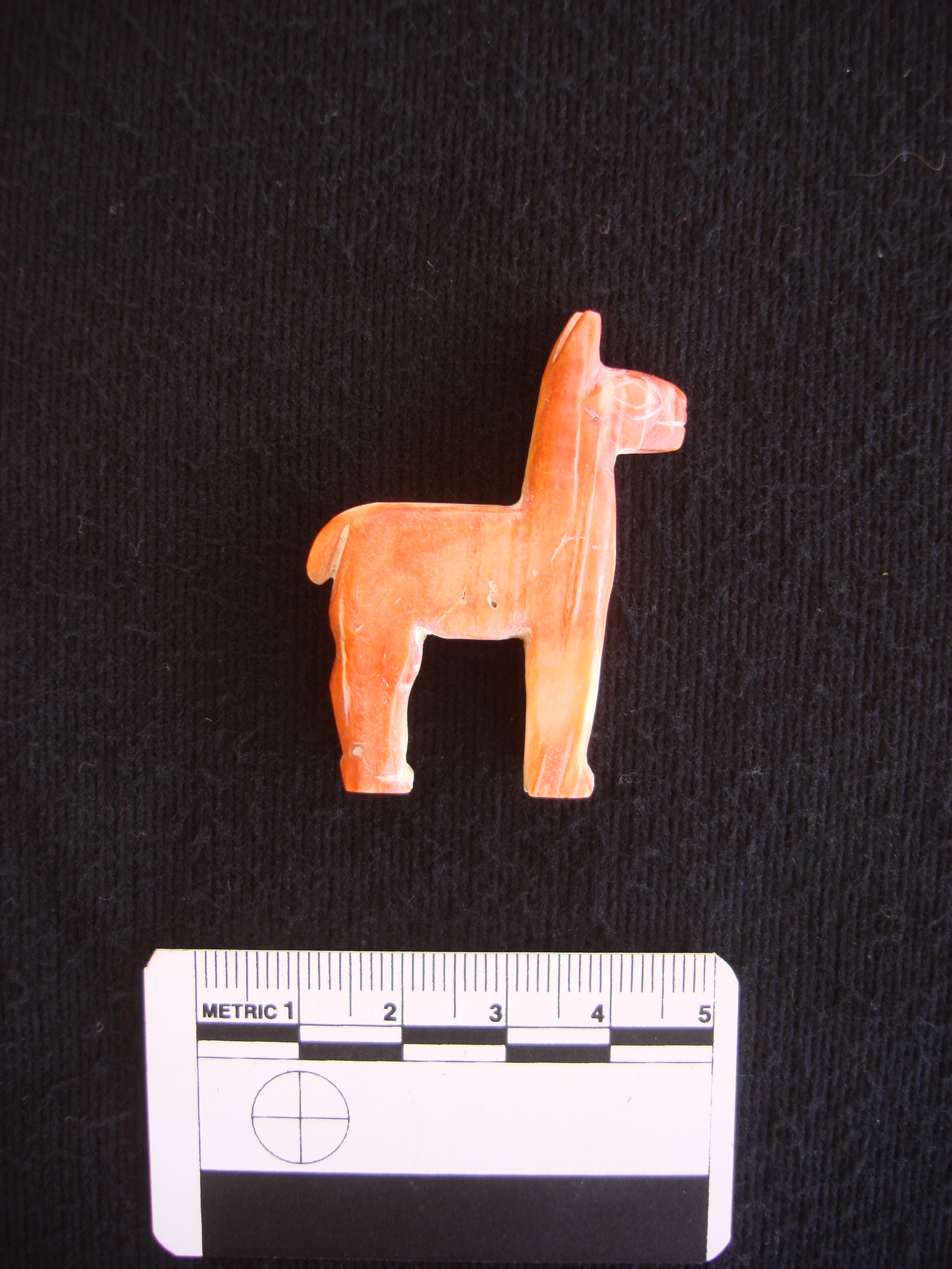 Ofrenda inca descubierta al lado del Podio de Control, un trono o plataforma especial. Es una pequeña llama elaborada en Spondylus, una valva muy apreciada en tiempos prehispánicos, pues era considerada alimento de los dioses y se la traía desde el actual litoral ecuatoriano, de donde es propia.